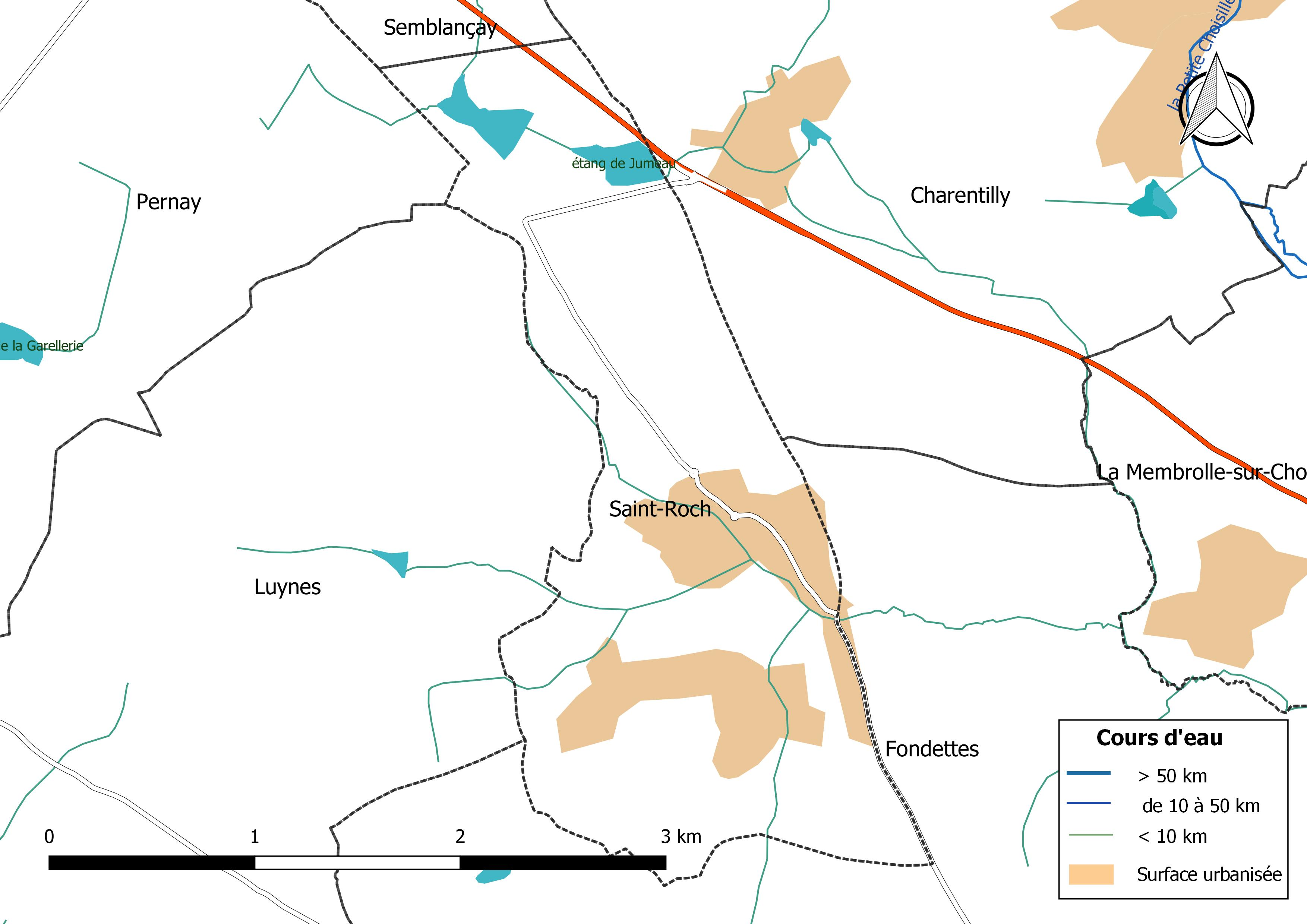 Carte du réseau hydrographique de la commune de Saint-Roch (France).